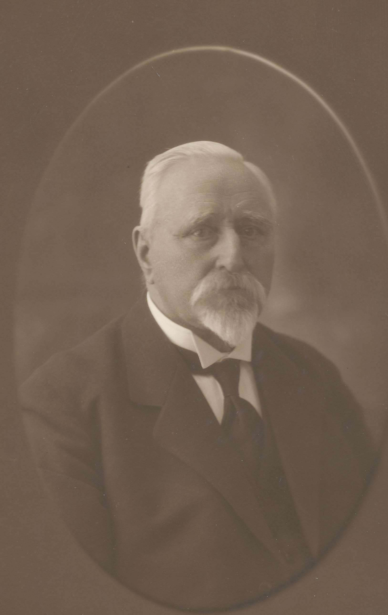 Format: Fotopositiv Dato / Date: ca. 1930 Fotograf / Photographer: G. Bjerkan Sted / Place: Ukjent Wikipedia: Johannes Okkenhaug (1857 - 1935) Digitalarkivet: Johannes Okkenhaugs husstand ved landbruksskolen i Levanger (Folketellingen 1910) Eier / Owner Institution: Trondheim byarkiv, The Municipal Archives of Trondheim Arkivreferanse / Archive reference: Tor.H41.B25.F1744 Johannes Karlsen Okkenhaug, (1857-1935), gårdbruker, skolestyrer og politiker for Venstre. Stortingsrepresentant for Nord-Trøndelag i fem perioder 1892-94 og 1916-27. Ordfører i Frol (Levanger landsogn) 1891-95, Sparbu 1901-04, 1907-10 og 1913-1916. Under Trøndelagsutstillingen i 1930 var han landbruksbestyrer og hovedstyrets formann.